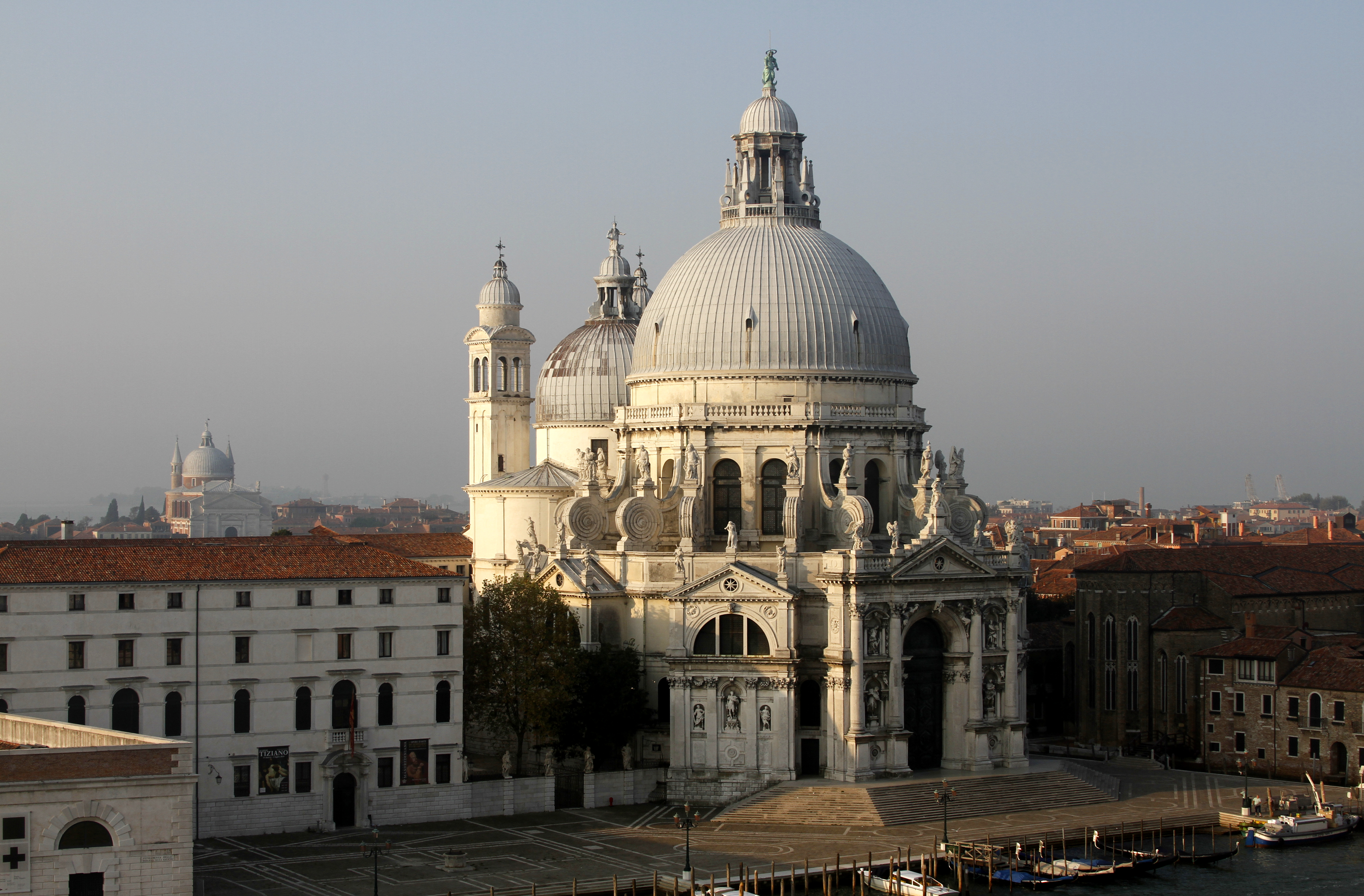 Views of Santa Maria della Salute, Venice